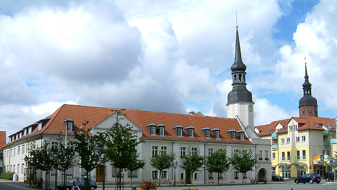 Rathaus von Spremberg/ Land Brandenburg/ Deutschland